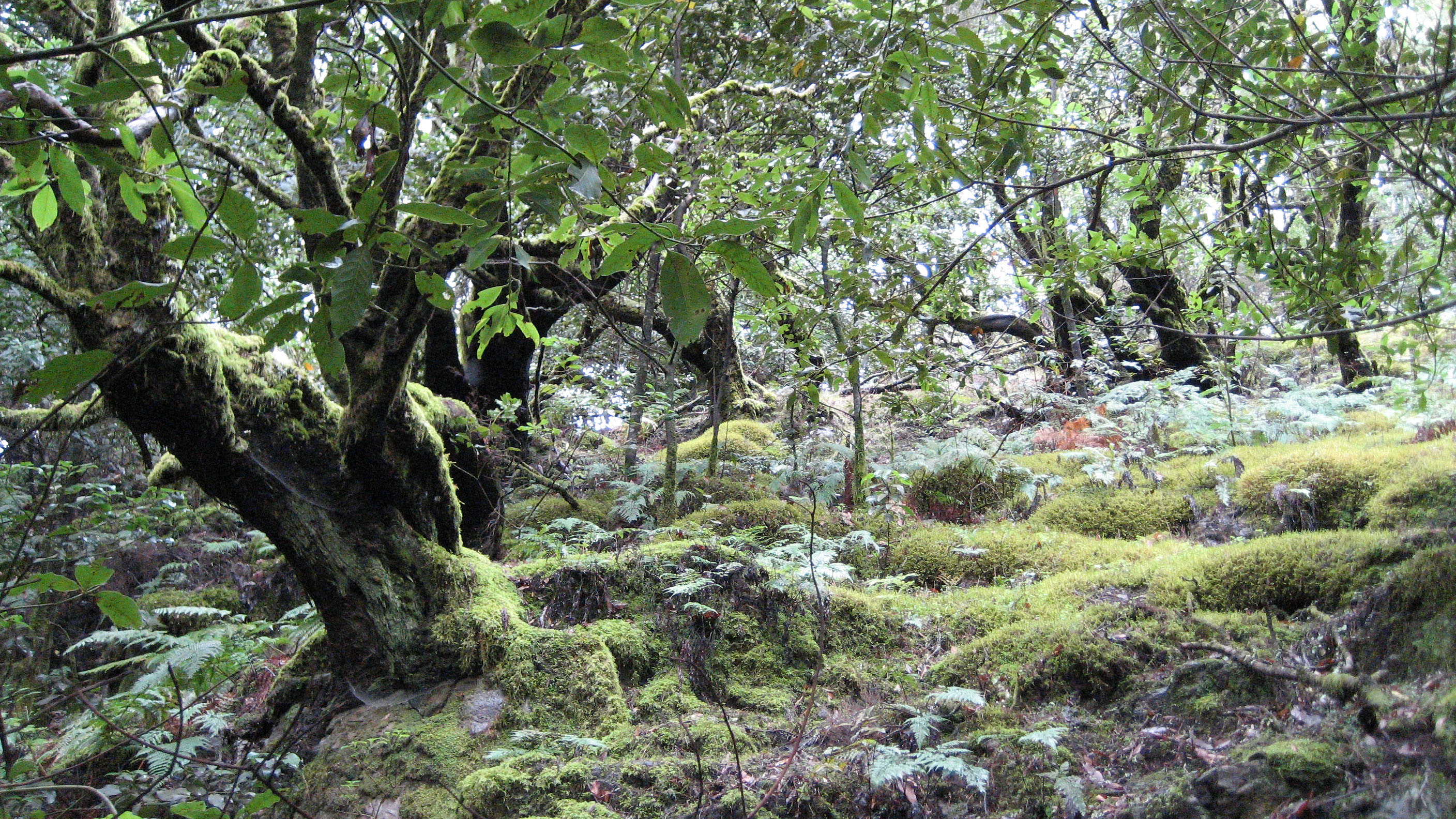 Lorbeerwald in Garajonay Nationalpark, La Gomera